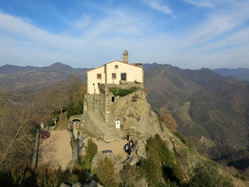 Santuari de Bellmunt, lloc del castell de Sa Reganyada a la comarca d' Osona